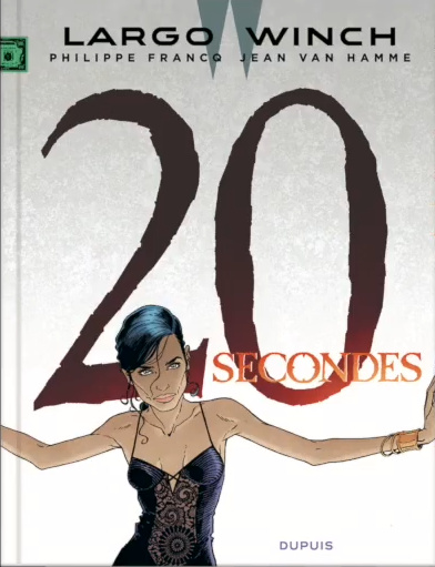 Couverture d'un des albums de Largo Winch (bande dessinée)